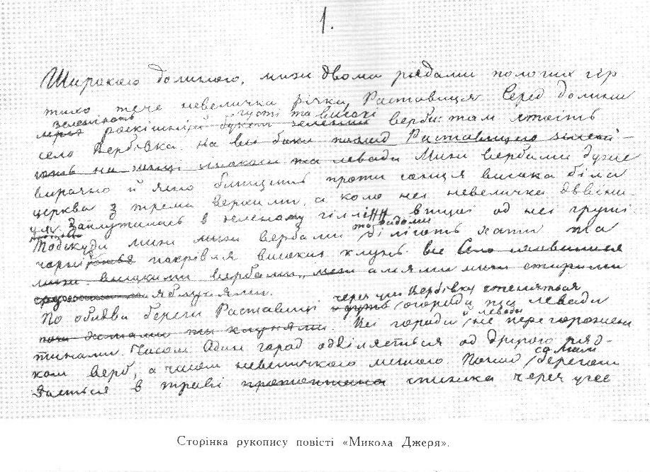 Фото рукопису І. Нечуя-Левицького "Микола Джеря"